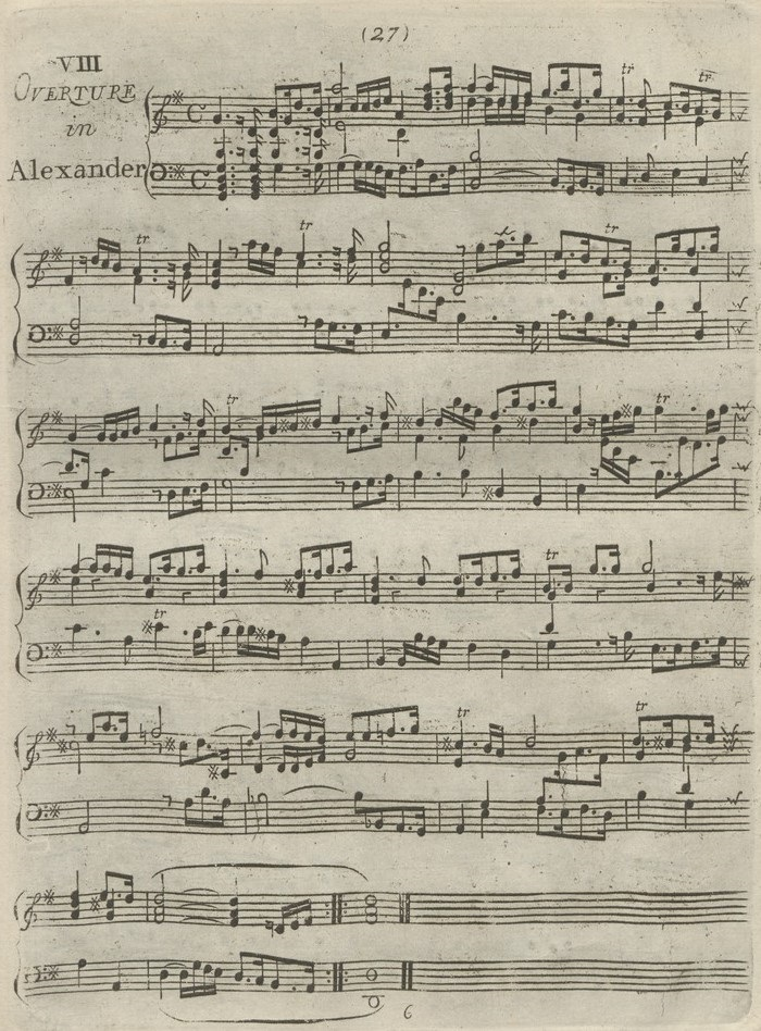 Alessandro: Beginn der Ouvertüre. Druck von John Walsh, London 1760 in: Handel’s overtures from all his operas and oratorios. Set for the harpsicord or organ.